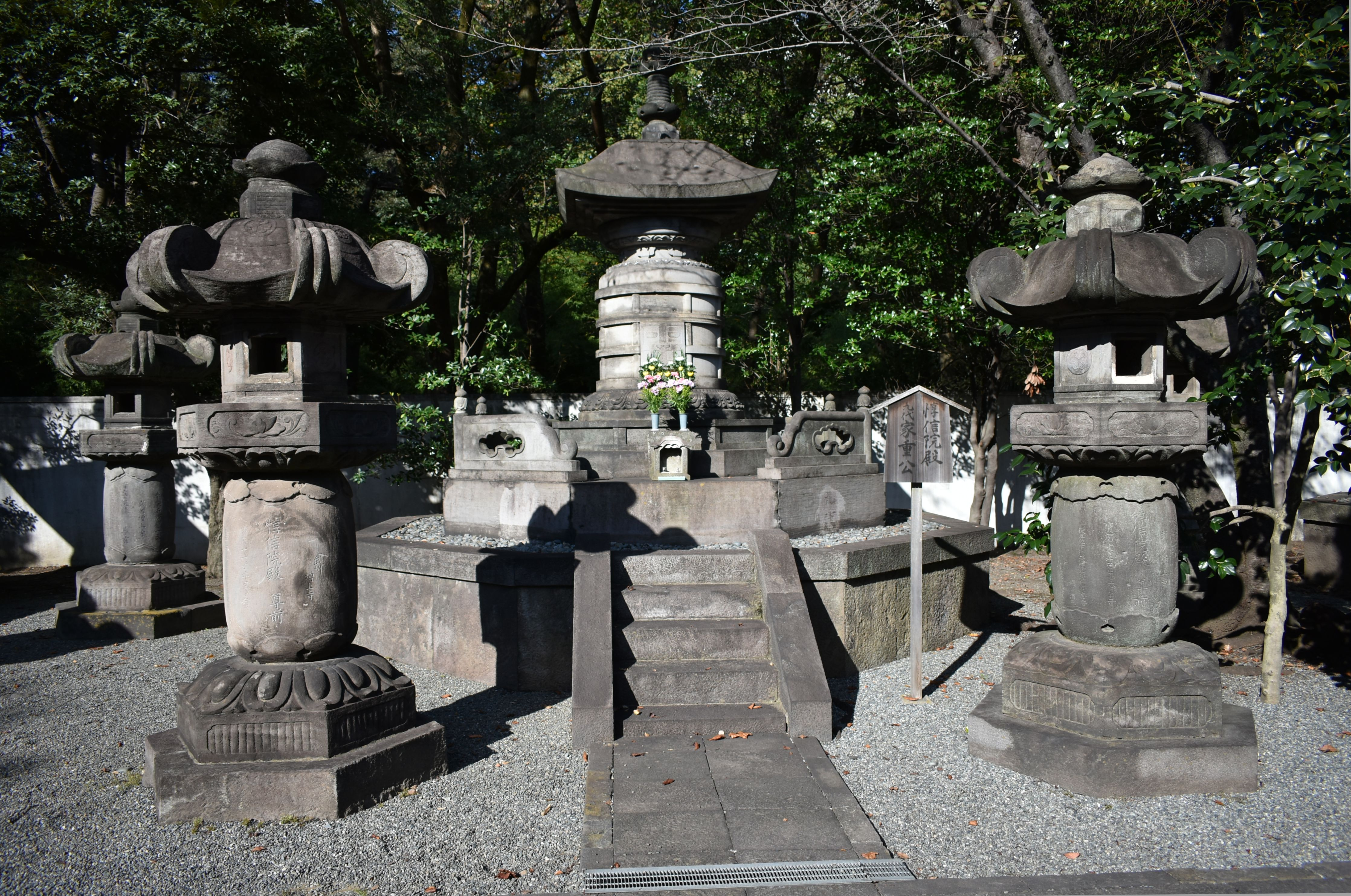 増上寺 御霊屋